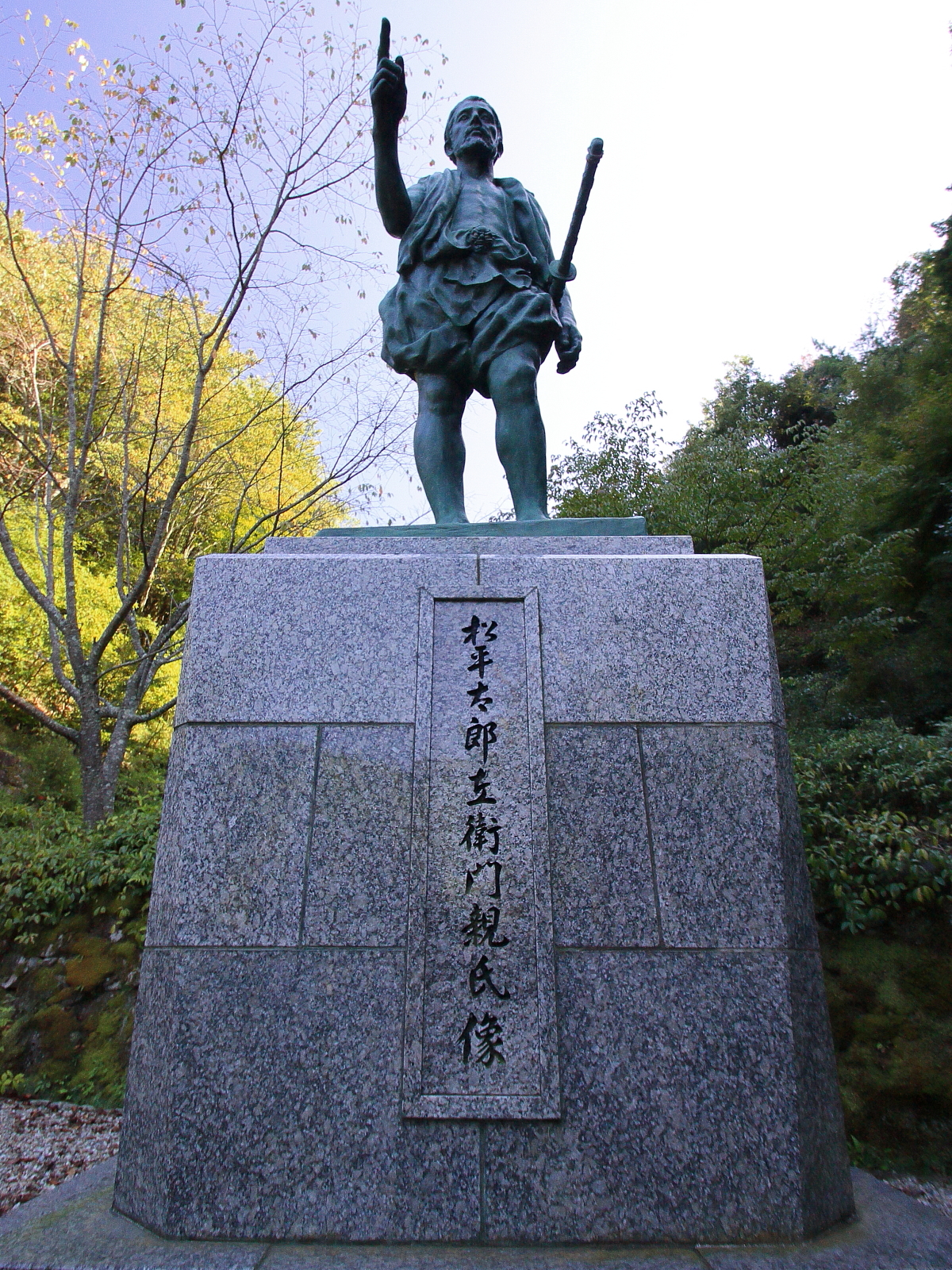 松平親氏公像（豊田市松平町、2009年）